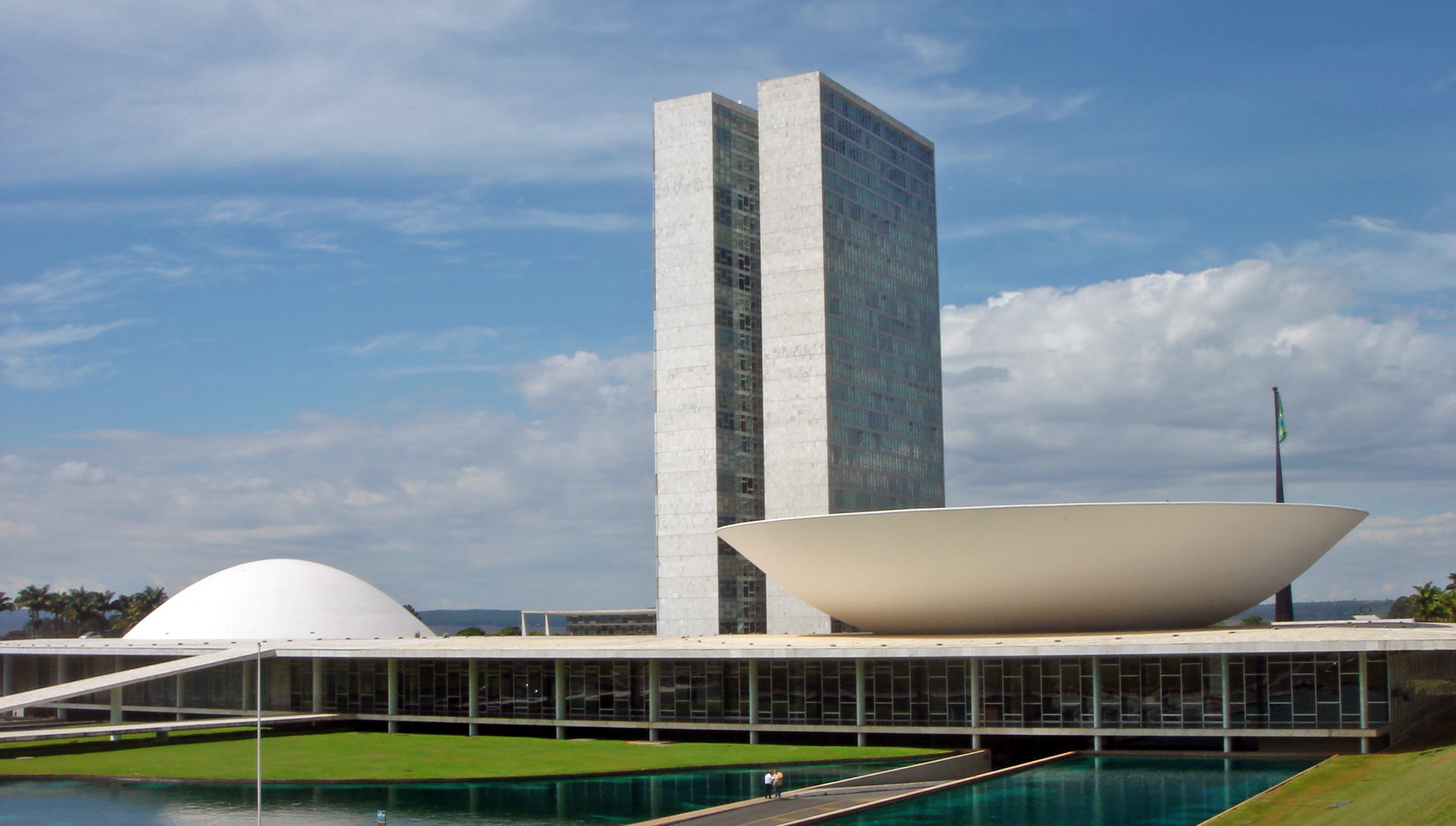 Brazil's National Congress, Brasilia, D.F.